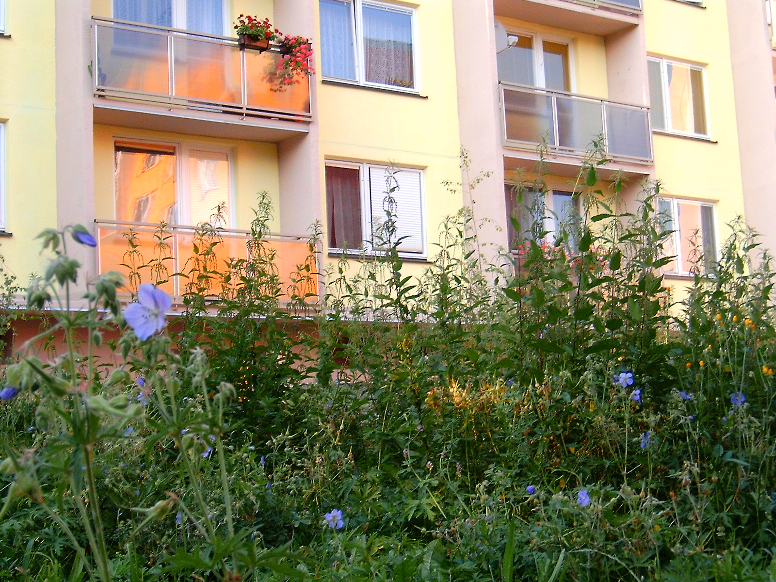 Brno_Komín, veřejná zeleň, volně rostoucí rostliny